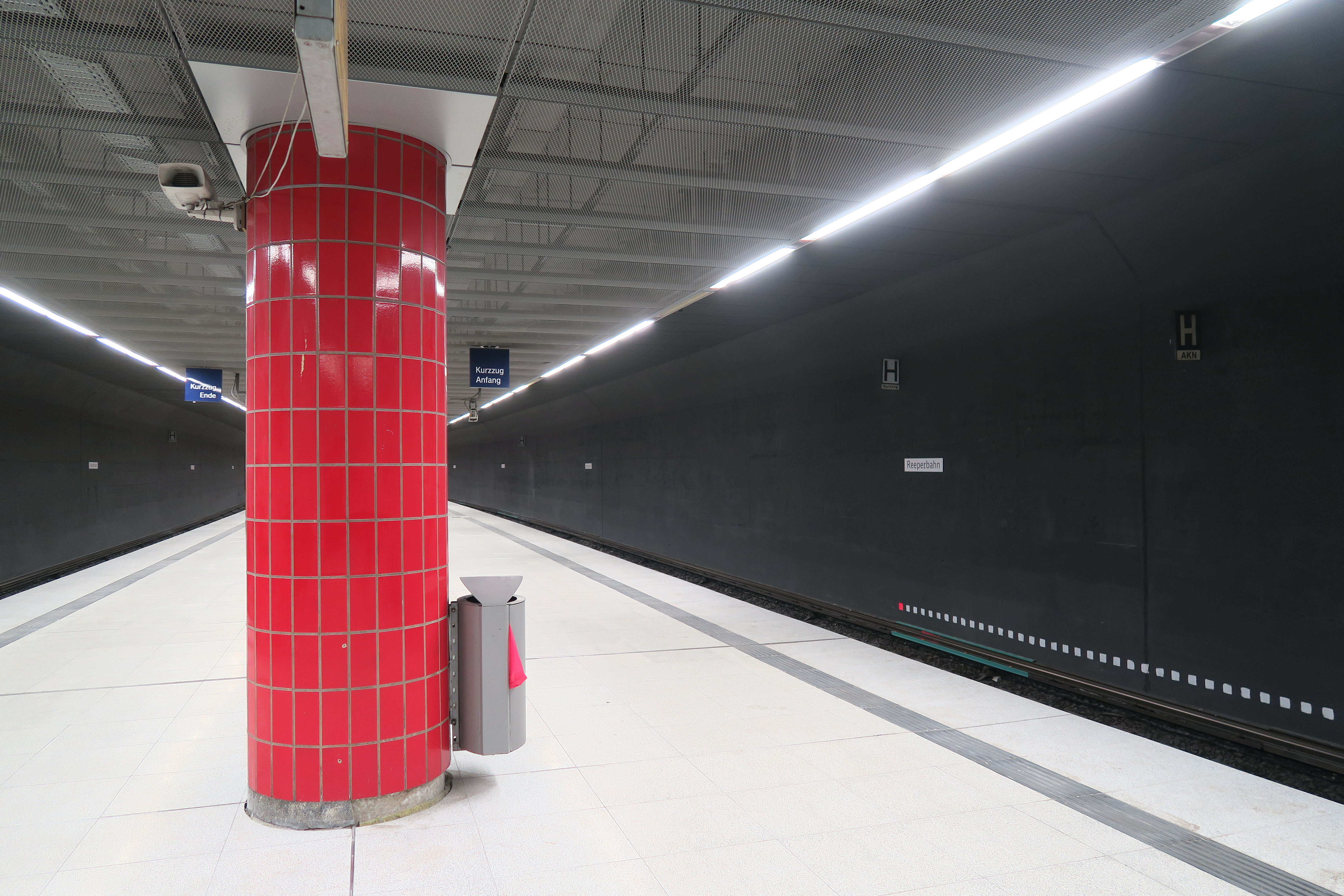 S-Bahnhof Reeperbahn, März 2018